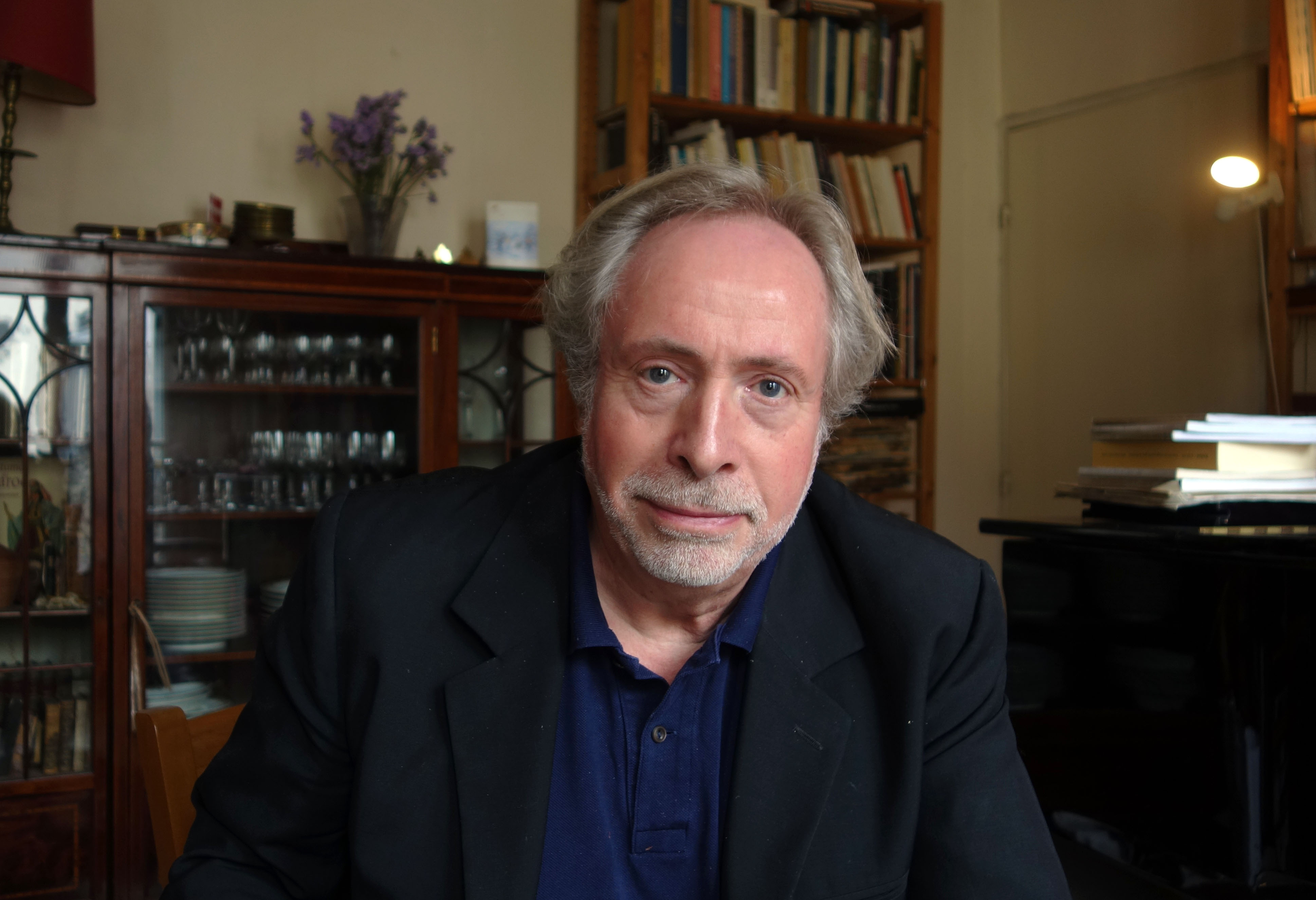 Le photographe et cinéaste Bruno de Monès, janvier 2017